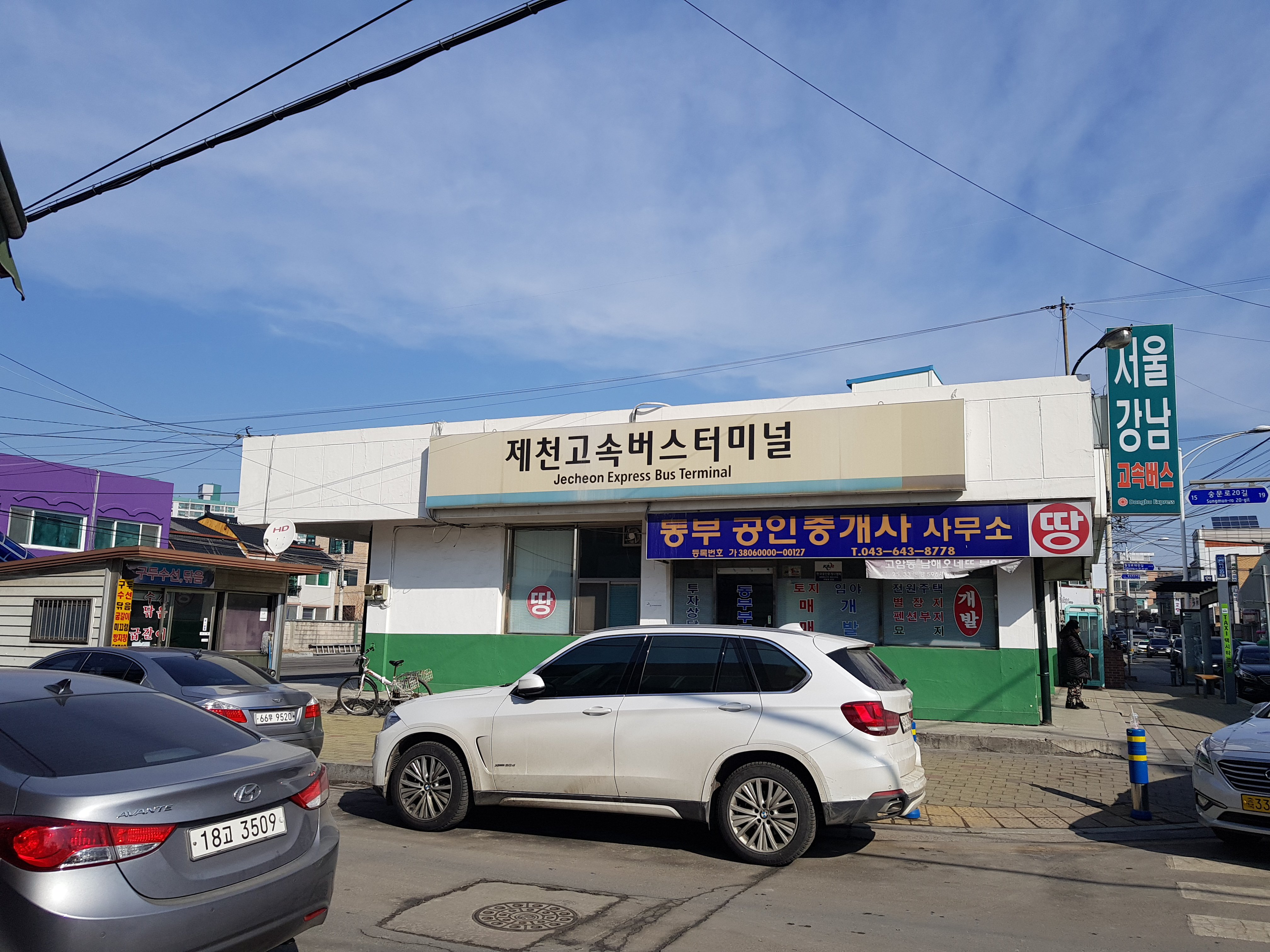 2018년 2월 15일에 촬영된 제천고속버스터미널